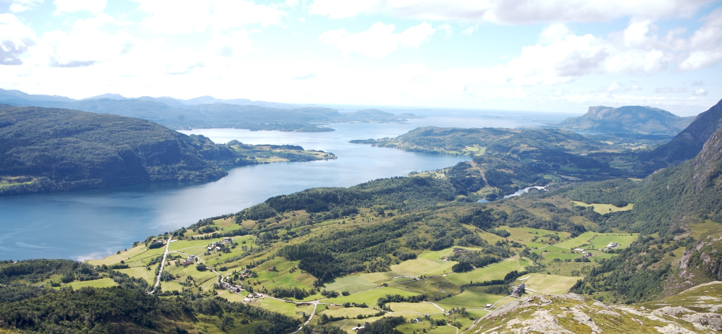 The image is cropped by me, User:Jorunn Neset ca. midt i biletet, på andre sida av fjorden, er Straumsnes. Innom Straumsnes heiter fjorden Dalsfjorden, utom heiter han Vilnesfjorden. Landet på andre sidan av fjorden er i Fjaler kommune, medan det på den sida der fotografen er er Askvoll. Gardane nedom fjellet/åsen fotografen er på er i Rivedal. Vegen ein ser gå ned mot fjorden til venstre i biletet er Riksveg 609. Vegen ein kan sjå konturane av på andre sida av fjorden er Fylkesveg 394 i Sogn og Fjordane. Vatnet til høgre i biletet er Bakkevatnet. In English (Translation by MyLegAlta) : The point near the centre of the picture, on the other side of the fjord, is Straumsnes. Beyond Straumsnes, the fjord is called Vilnesfjorden, and inland from that point, it is named Dalsfjord. The municipality of Fjaler is on the other side of the fjord, while the photo was taken from the municipality of Askvoll.The farms seen blow the mountain form the which the photo was taken are located in Rivedal. The road on the left side of the picture going down towards the fjord is Riksveg 609. The contour of Fylkesveg 394 can be seen on the other side of the fjord. The body of water on the right of the picture is called Bakkevatnet.